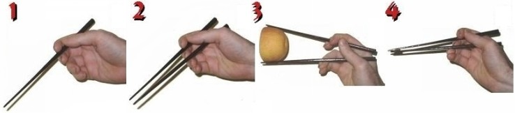 Image d'utilisation des baguettes